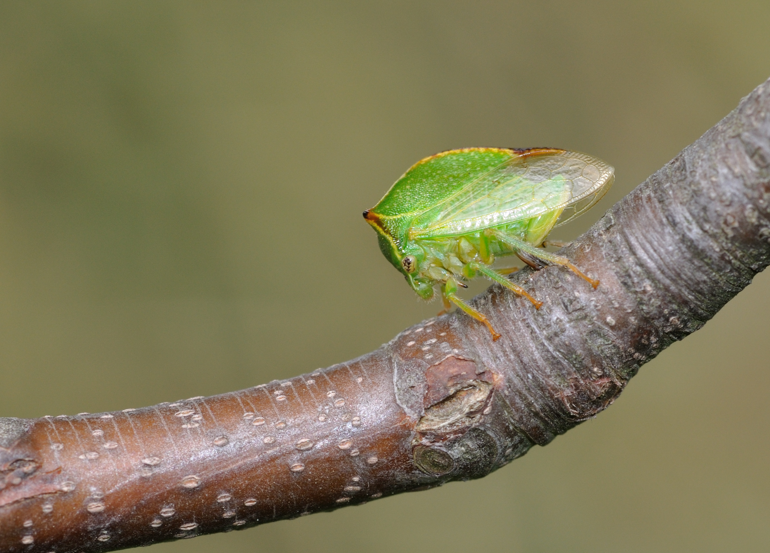 Weibliche Büffelzikade (Stictocephala bisonia) beim Bohren eines Loches zur Eiablage in einen Bergahorn-Zweig (Acer pseudoplatanus) in Oberursel, Deutschland.